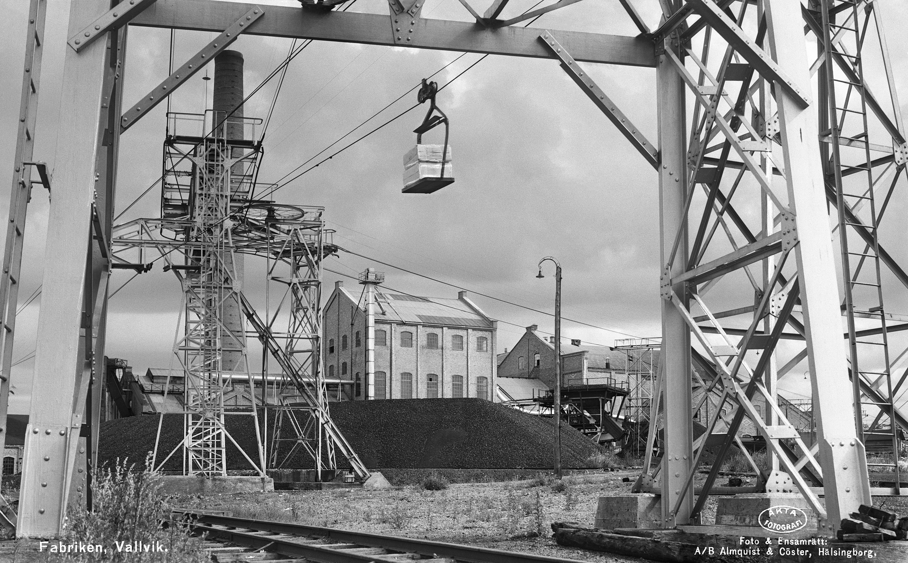 Vallvik pulp mill, south of Söderhamn. Massafabriken Vallviks bruk, söder om Söderhamn. Parish (socken): Söderhamn (earlier Ljusne parish) Province (landskap): Hälsingland Municipality (kommun): Söderhamn County (län): Gävleborg Photograph by: Unknown. Almquist & Cöster Date: 1940-1955 Format: Cliché, glass plate with text Persistent URL: Read more about the photo database (in english)